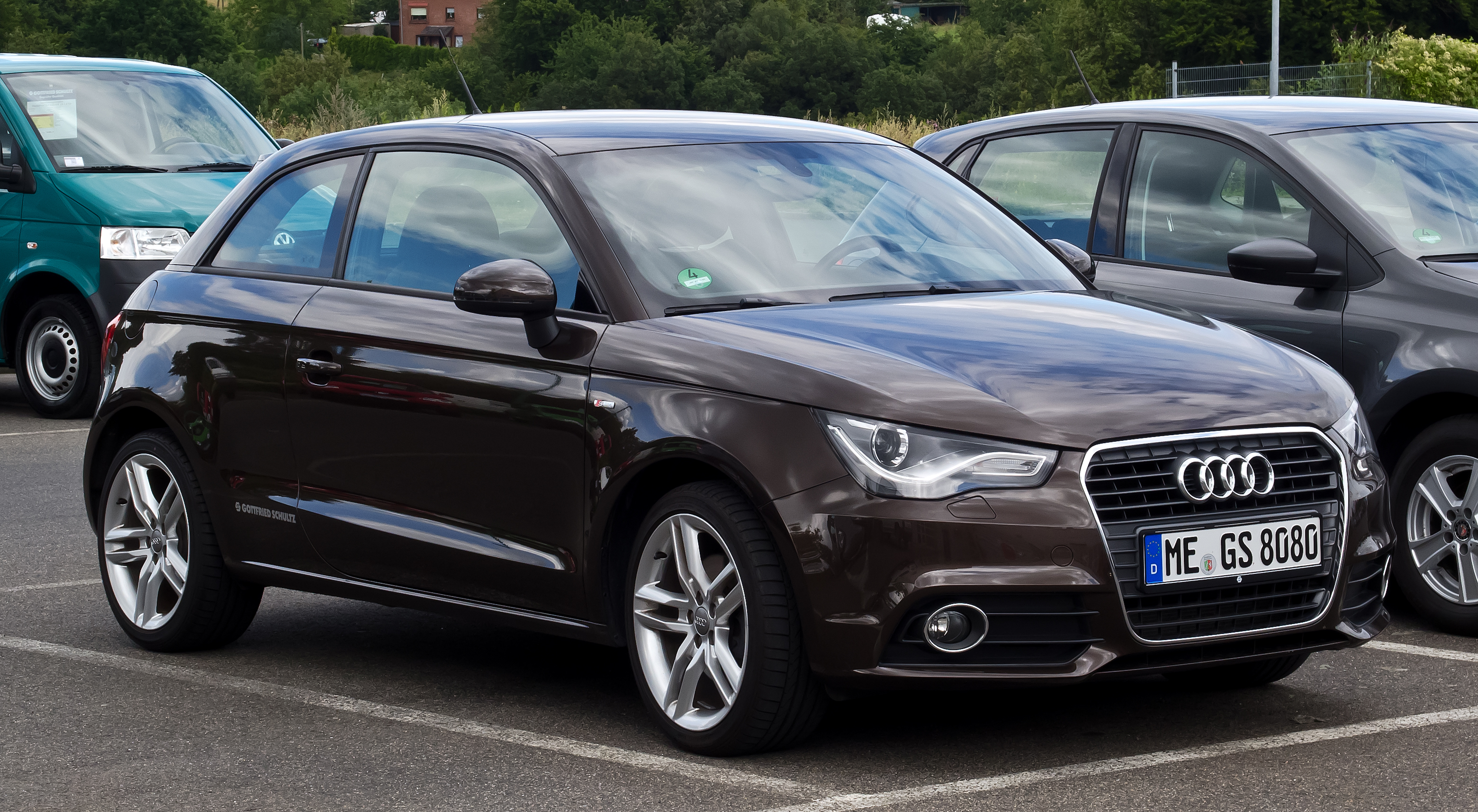 Audi A1 1.4 TFSI Ambition S-line